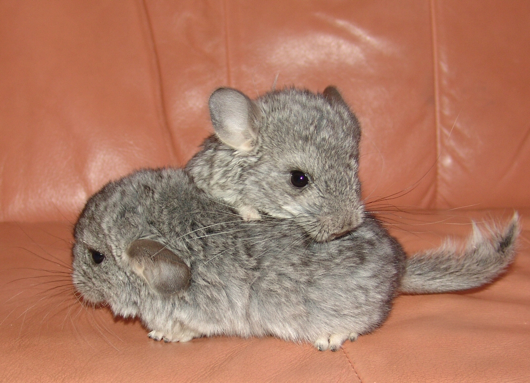 Domestic chinchillas (Chinchilla lanigera x chinchilla brevicaudata), 2 babies.